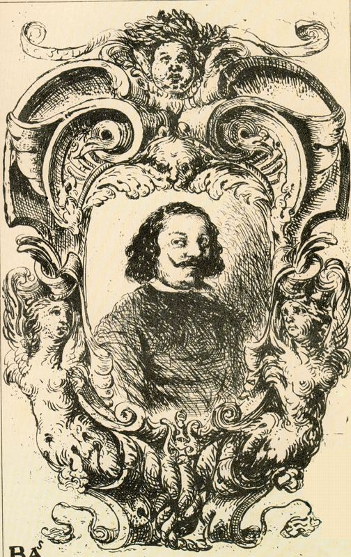 Retrato de Juan de Valdés Leal, firmado BAL.S, Aguafuerte, Madrid, Biblioteca Nacional